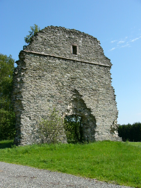 Ruine der Heilingskirche bei Neufang (auch Drei Marienkirche), Wallfahrtskirche, verfiel nach der Reformation